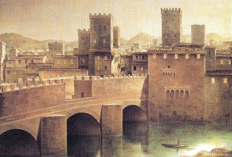 L' antica fortificazione di Ponte Vecchio